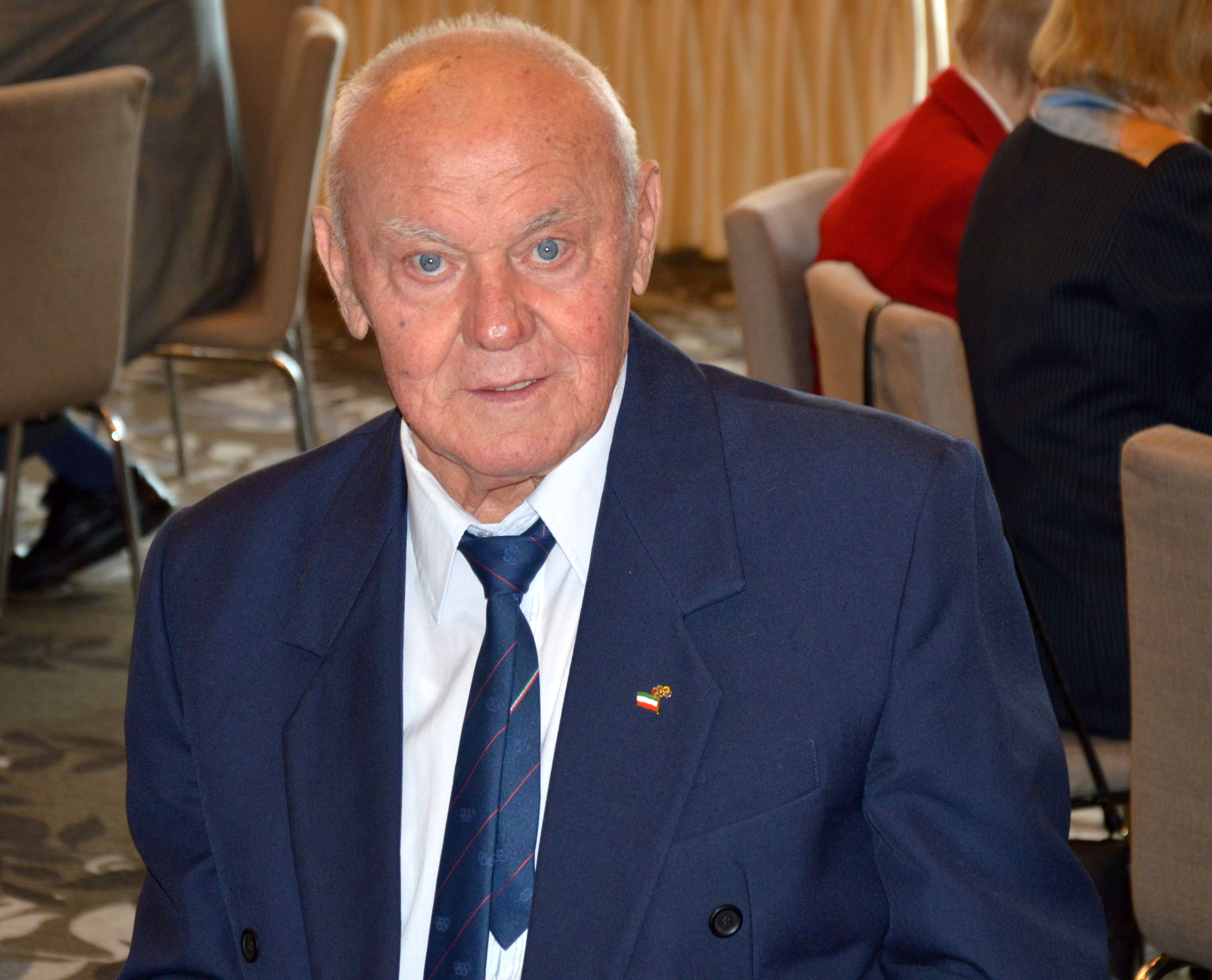 Hevesi István olimpiai bajnok vízilabdázó